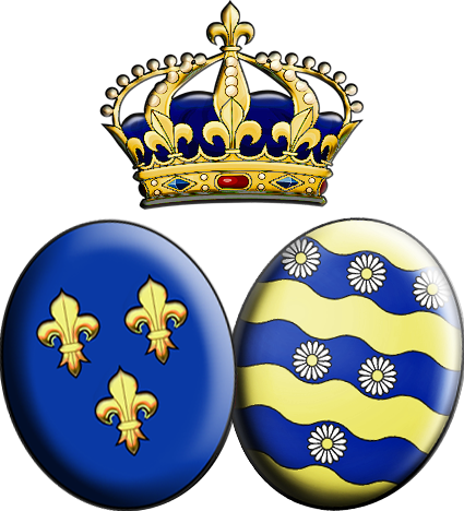 Armes de María Margarita de Bourbon, née Vargas Santaella (avec armes de droite dessinées par Reliavech)